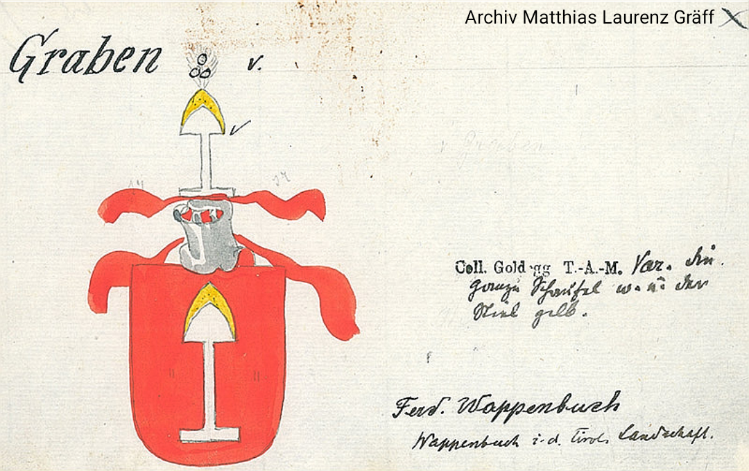 Wappenvariante der Herren von Graben (Tiroler Linie). Wappenbuch in der Tiroler Landschaft. Archiv Matthias Laurenz Gräff